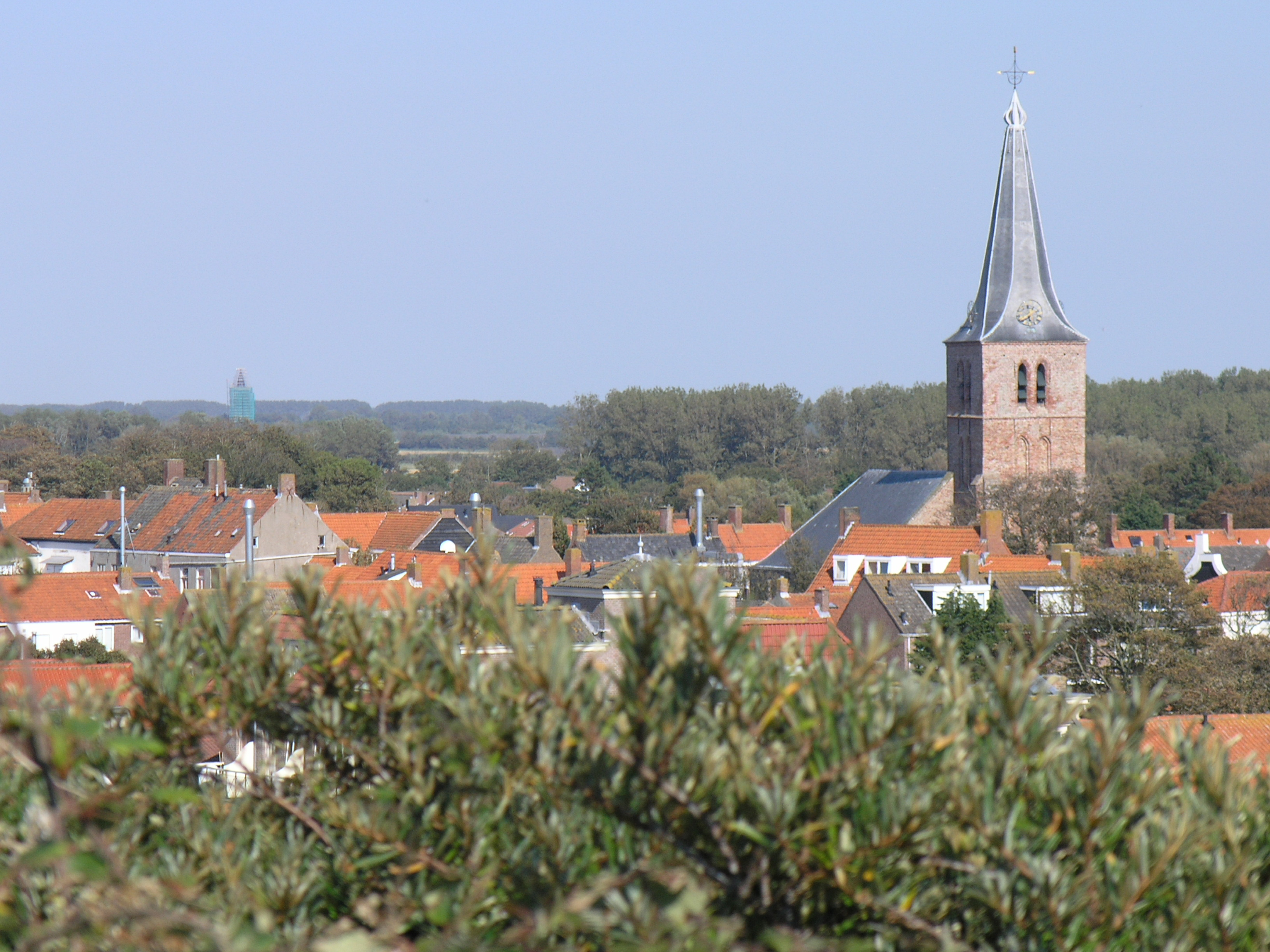 Domburg vanaf de Hoge Hil